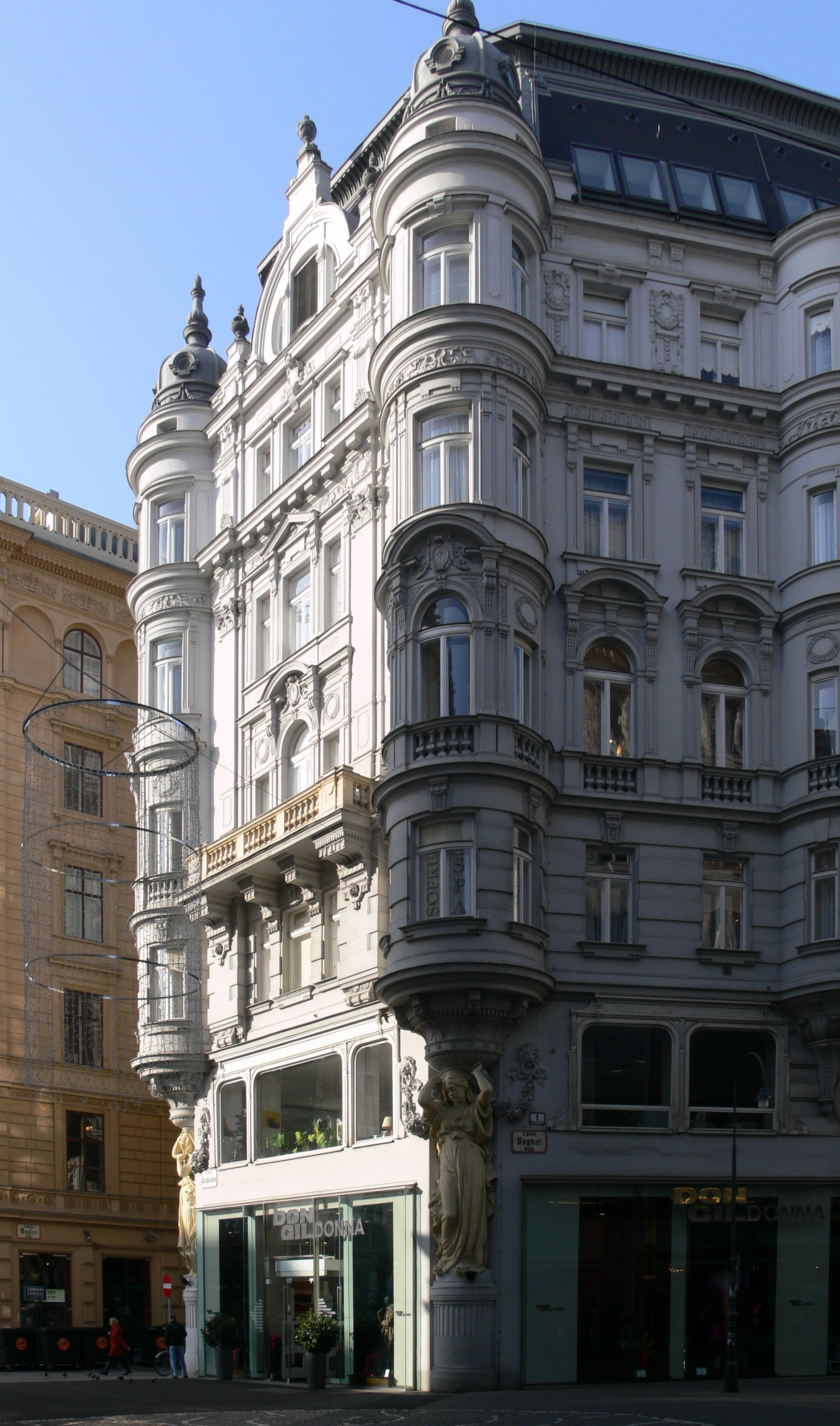 Wien, Haus Ecke Tuchlauben / Bognergasse / Naglergasse, Tuchlauben 1, erbaut 1901 von Christian Ulrich